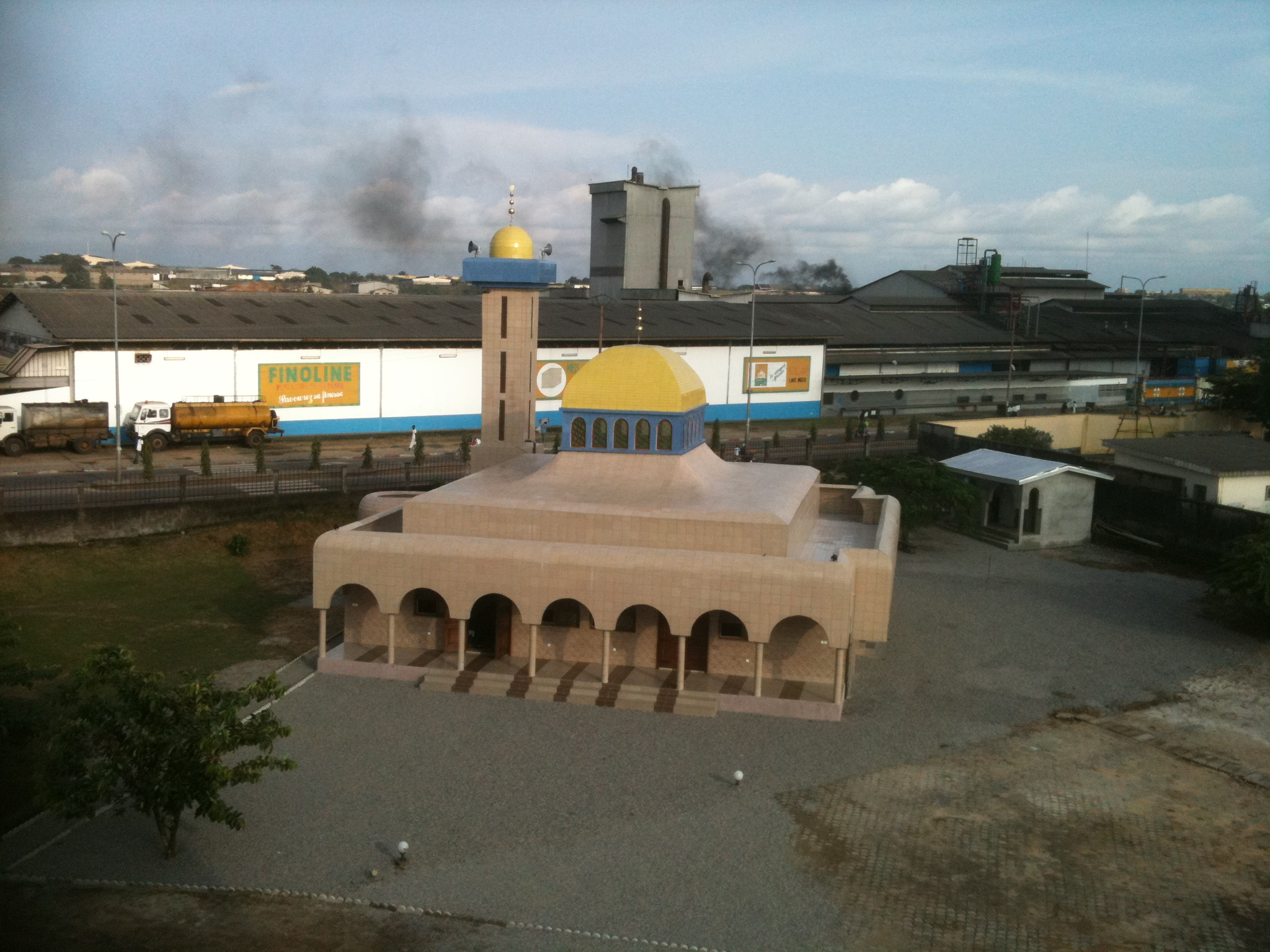 mosquee du groupe Fadil